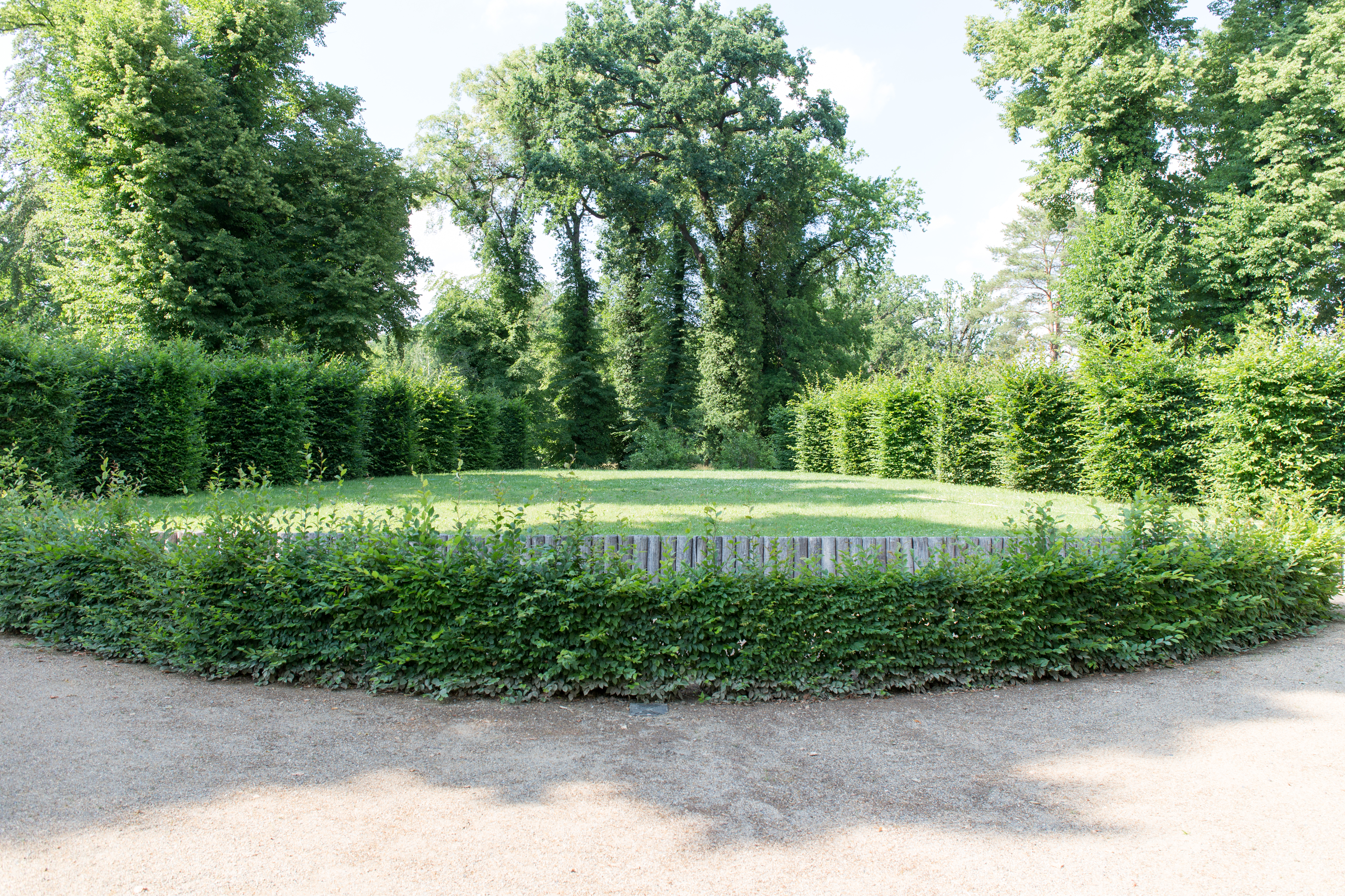 KulTour Parkanlage Sanssouci Heckentheater am Neuen Palais